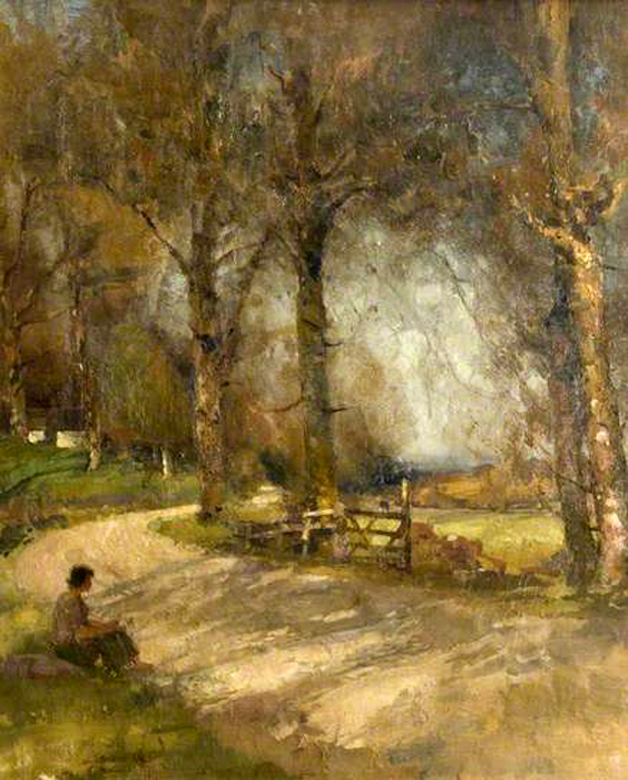 óleo sobre lienzo - 59 cm. x 49,2 cm.- Dumfries and Galloway Council (Gracefield)